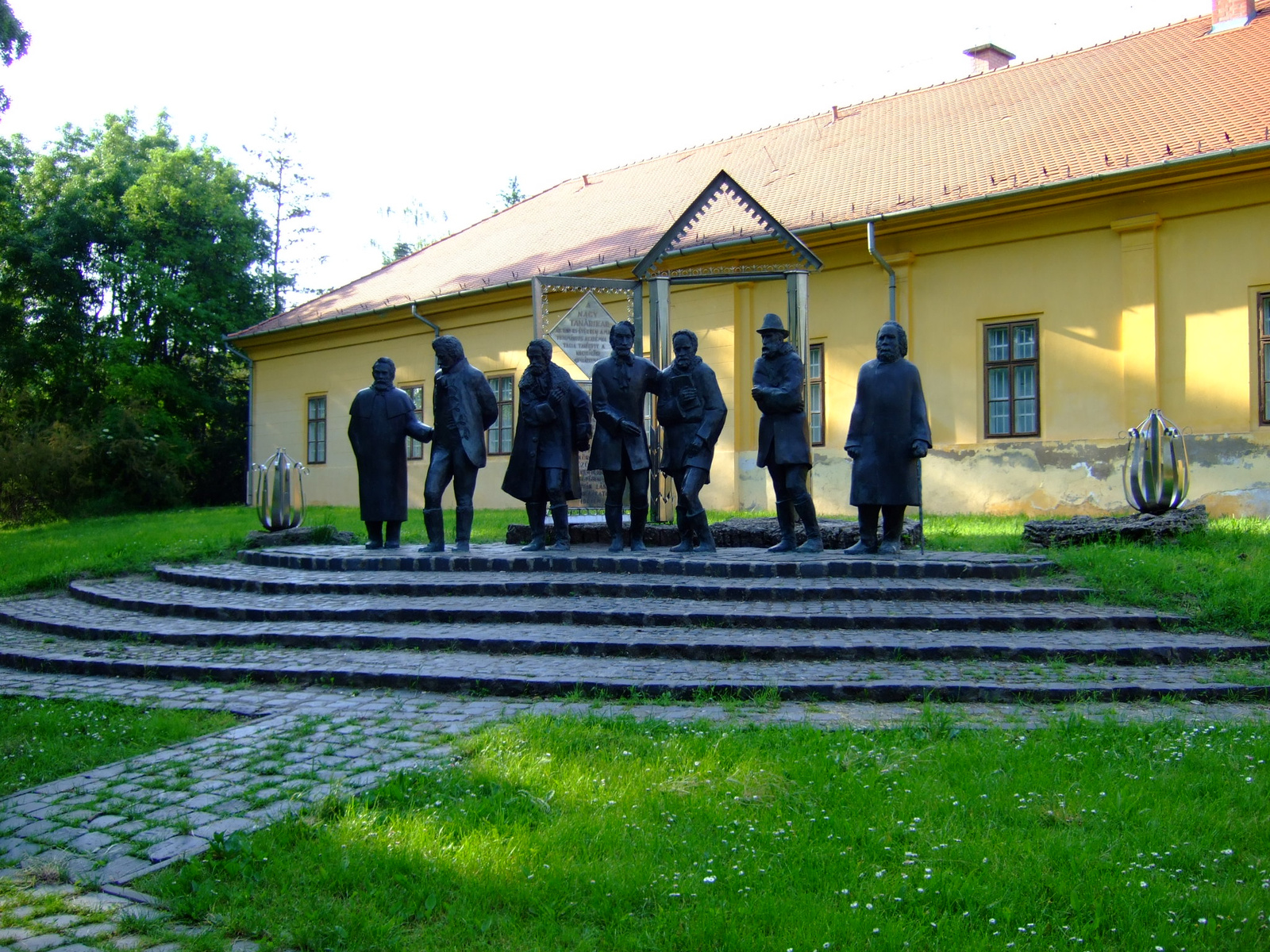 Arany János Múzeum, volt méntelep, huszárkaszárnya (Nagykőrös, Abonyi út 2.) This is a photo of a monument in Hungary. Identifier: 7157